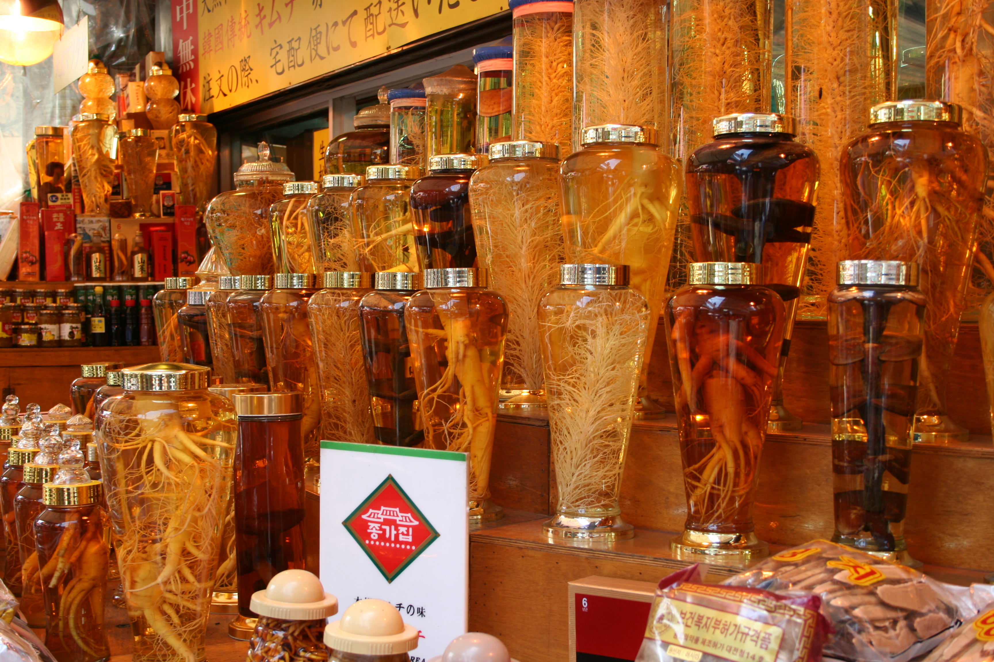 Namdaemun Market